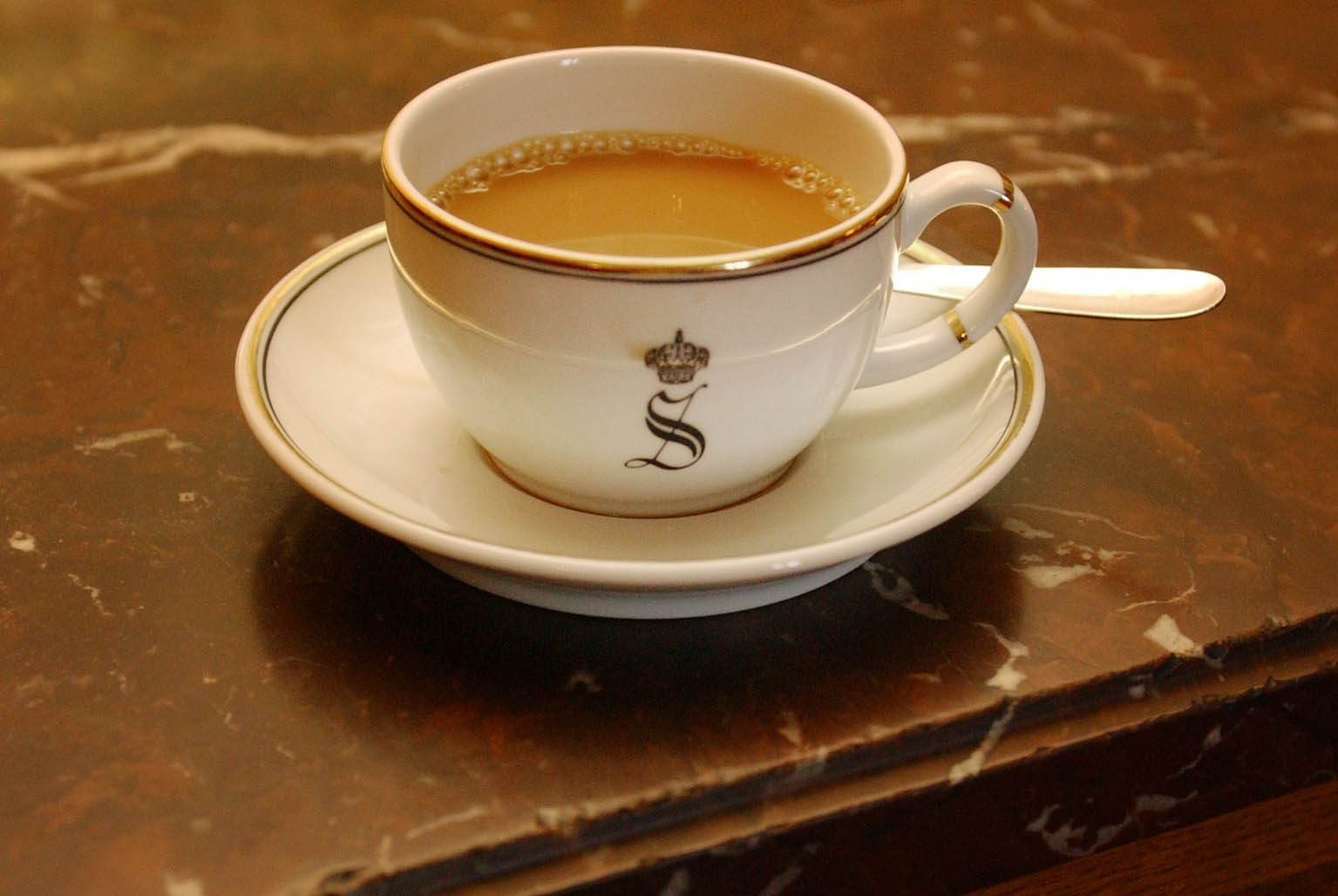 Een kop koffie in de Belgische Senaat.